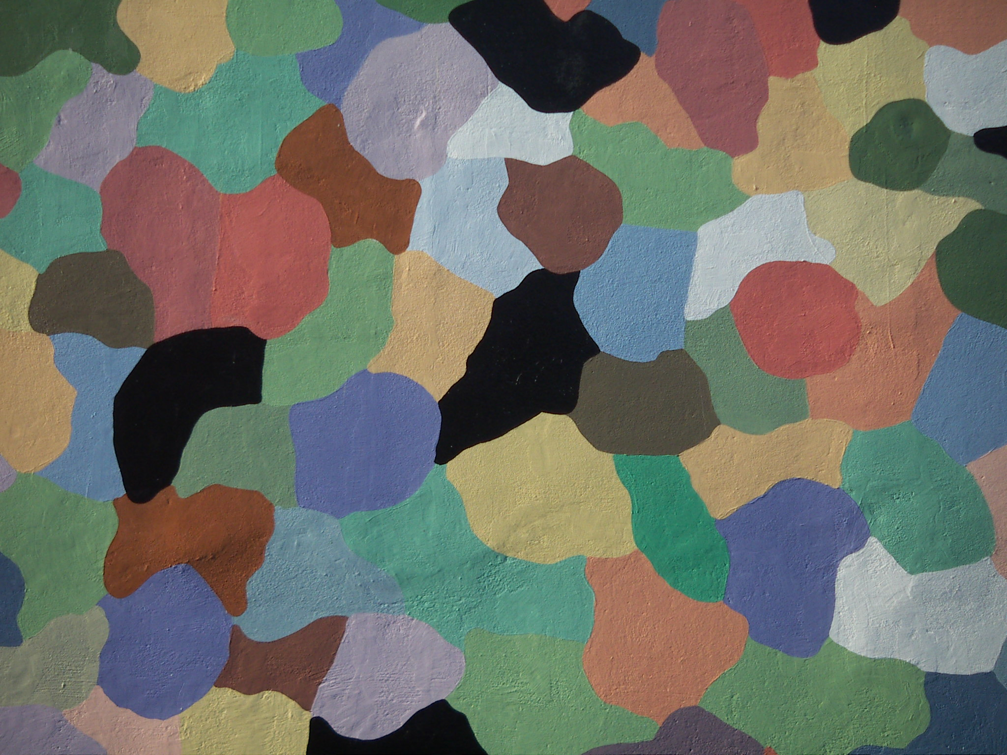 Leonhardskirche (Feldbach), freistehender Glockenstuhl aus Beton, Detail, 1987 von Gustav Troger, Kunst im öffentlichen Raum